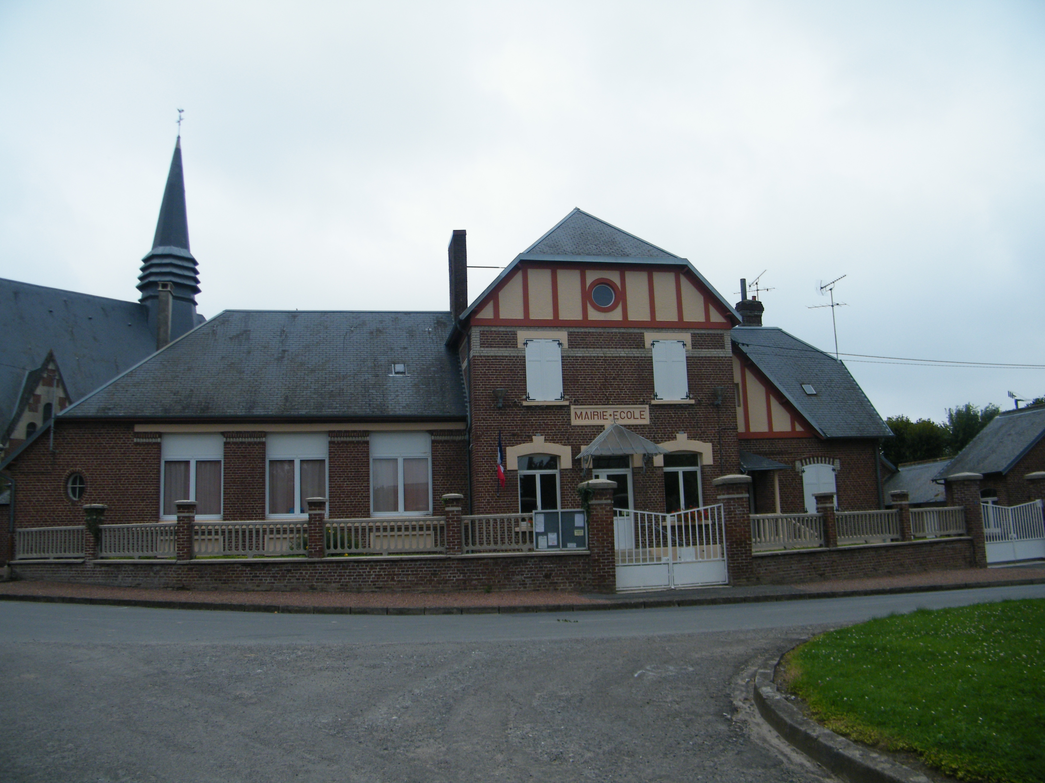 Mairie.